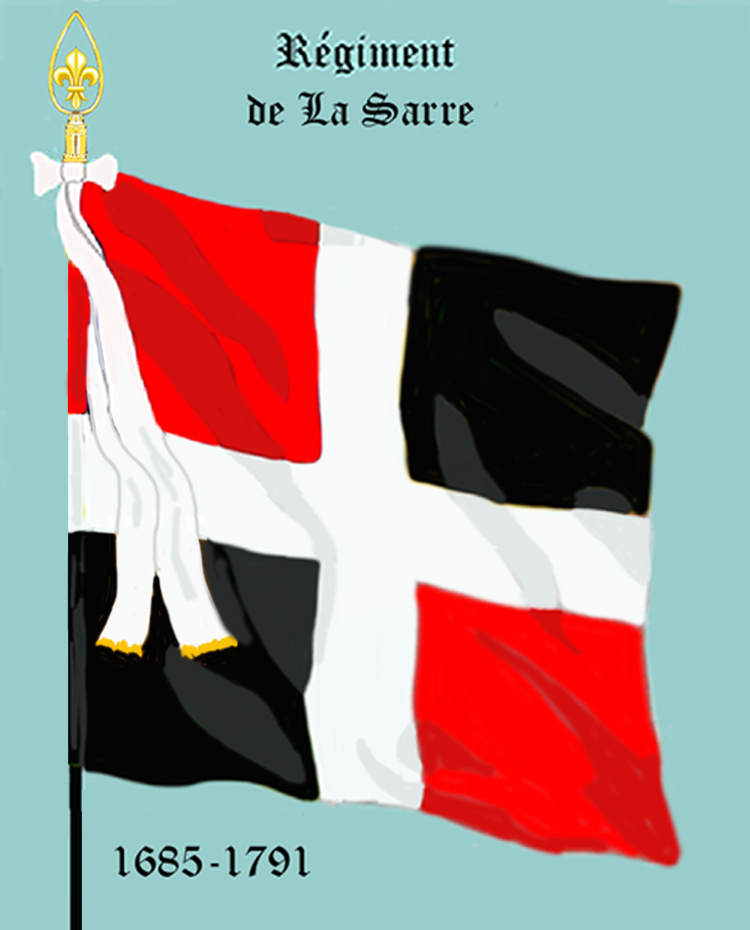 Ordonnanzfahne eines königlich französischen Infanterie-Regiments. - Entnommen und überarbeitet aus: „LES UNIFORMES ET LES DRAPEAUX DE L'ARMÉE DU ROI“ Marseille 1899. (Drapeau d'Ordonnance d' un régiment française d'infanterie royale.)